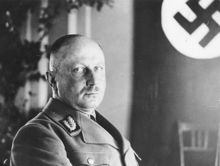 Gauleiter Kube, Oberpräsident der Provinz Brandenburg [1933]